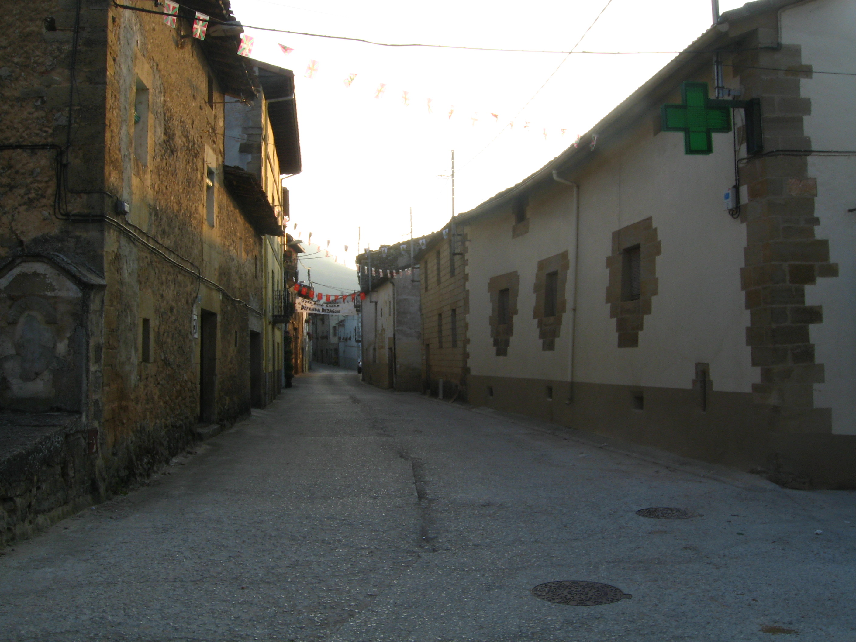 Cabredo, municipio de Navarra, España.